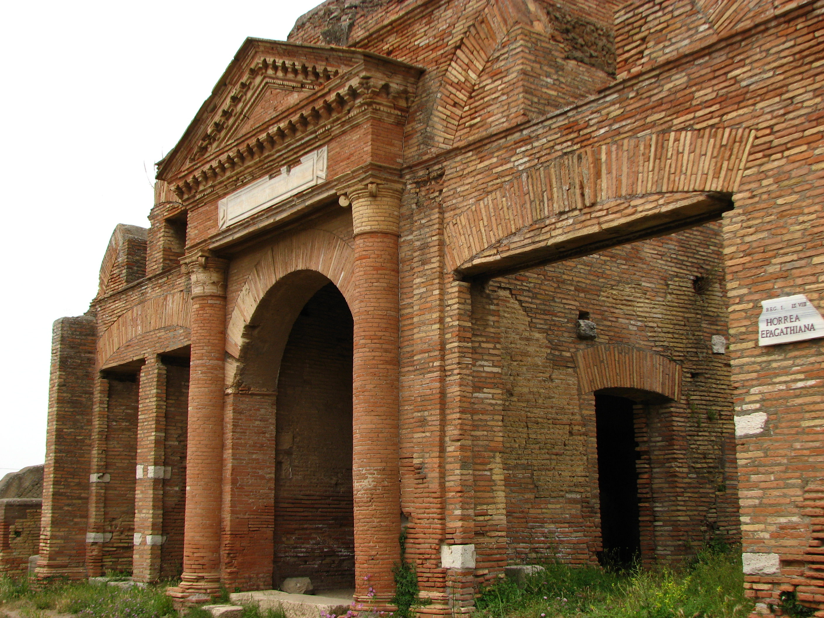 Ostia Antica, Roma, ItaliaIMG_1362 Ostia Antica